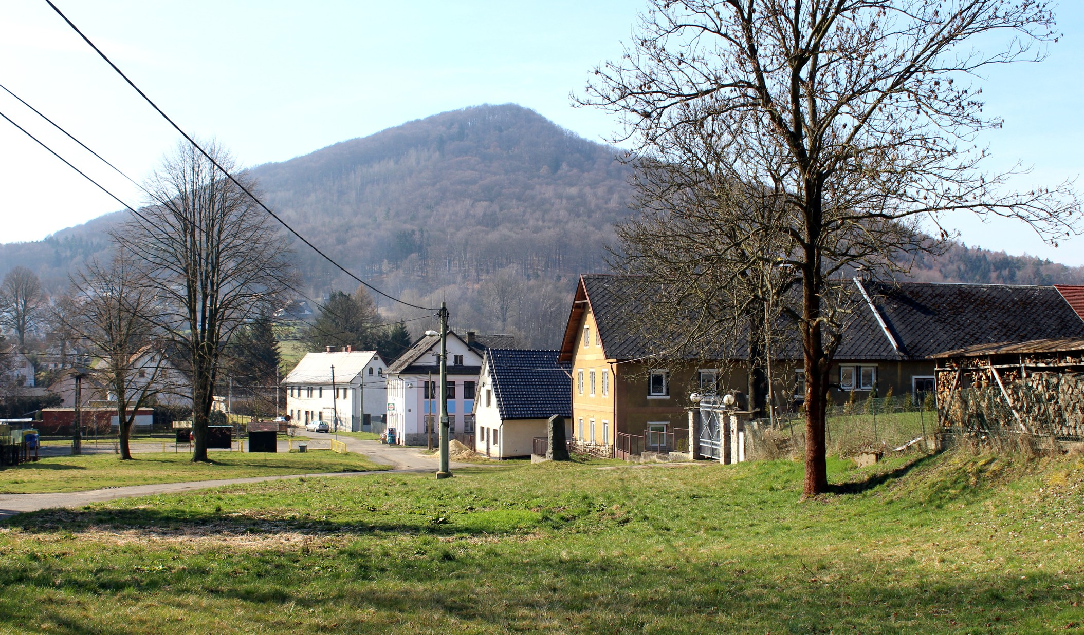 Postřelná